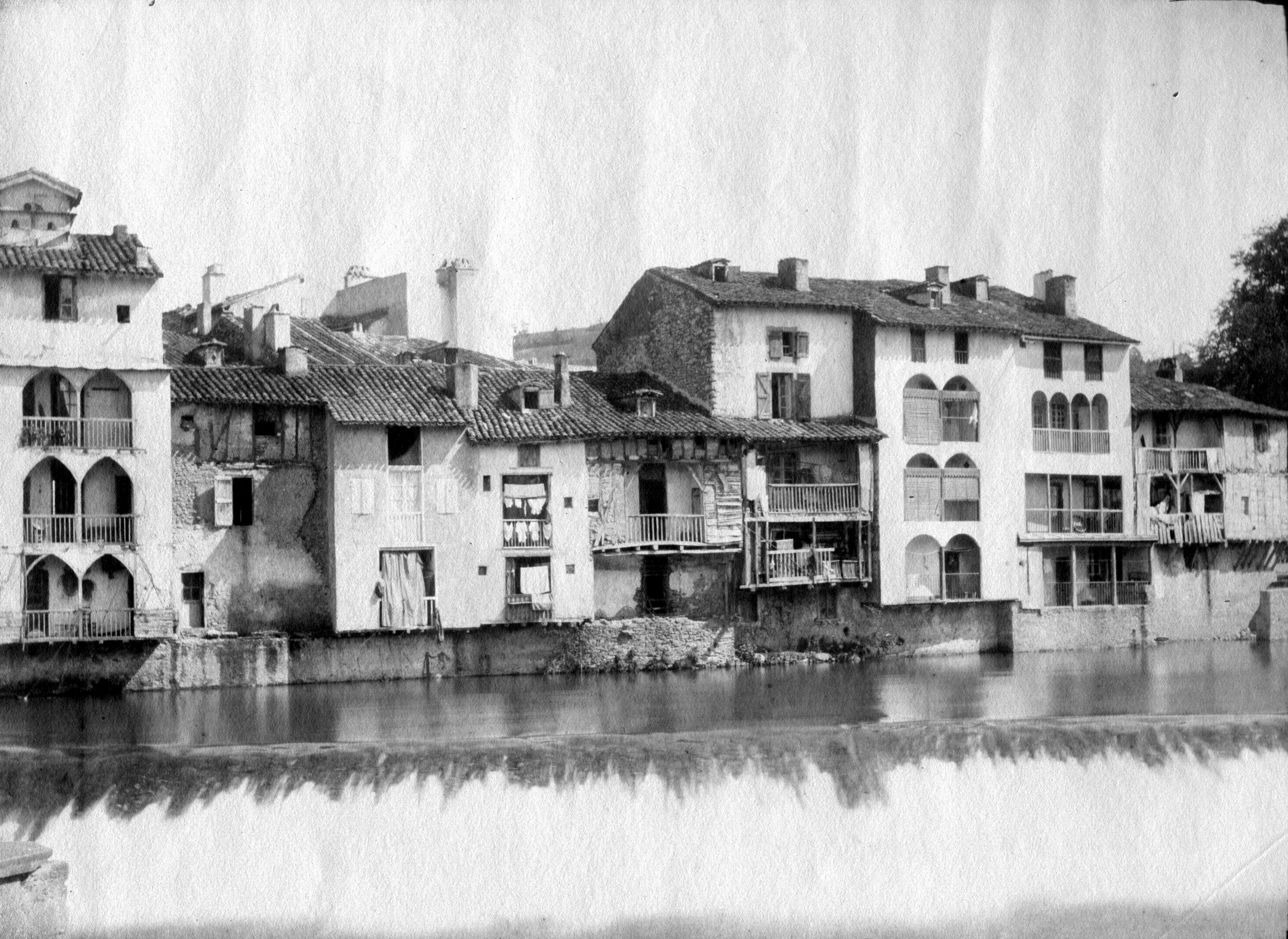 Rive gauche du Salat à Saint-Girons, Ariège.